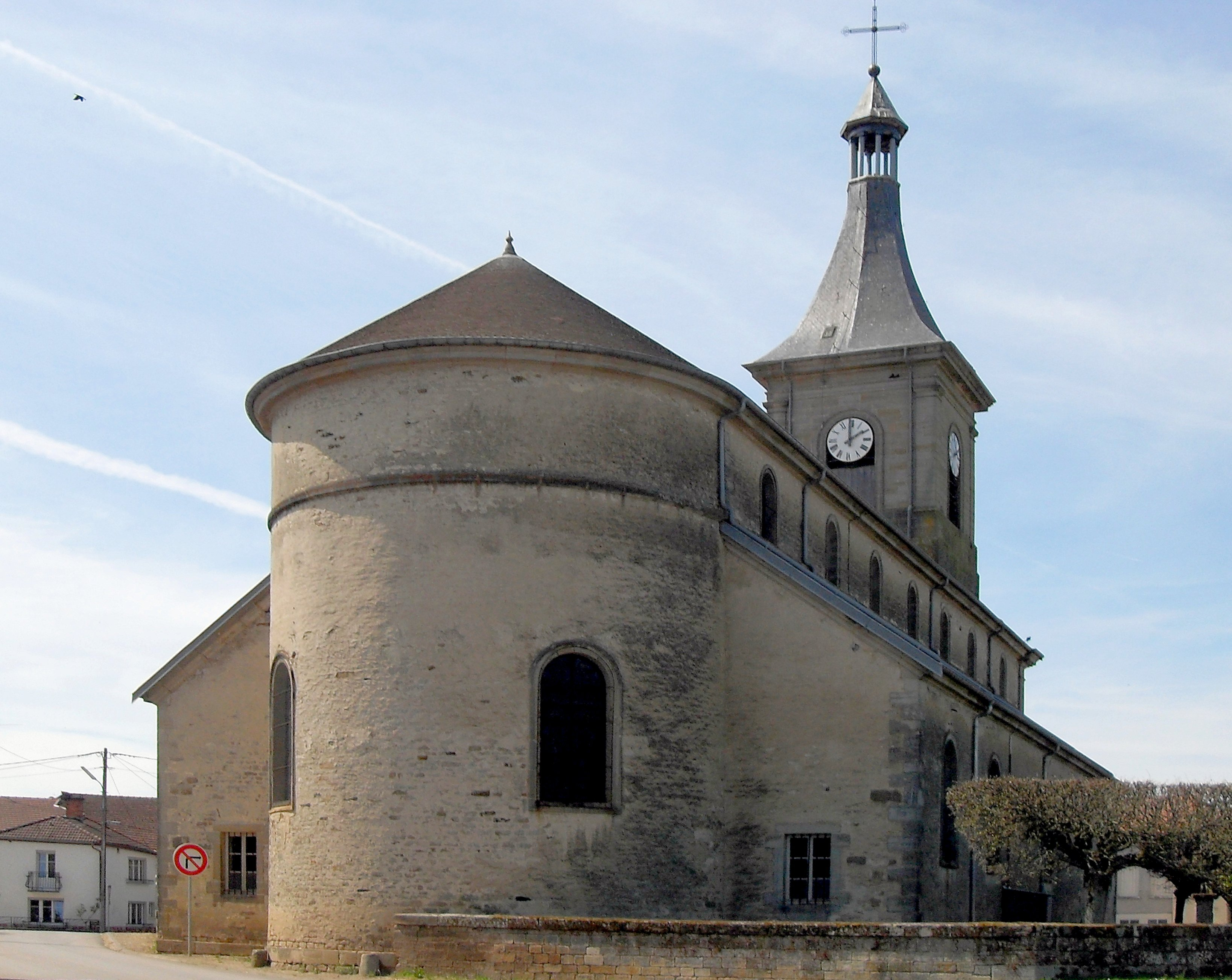 L'église Notre-Brice de Sauville